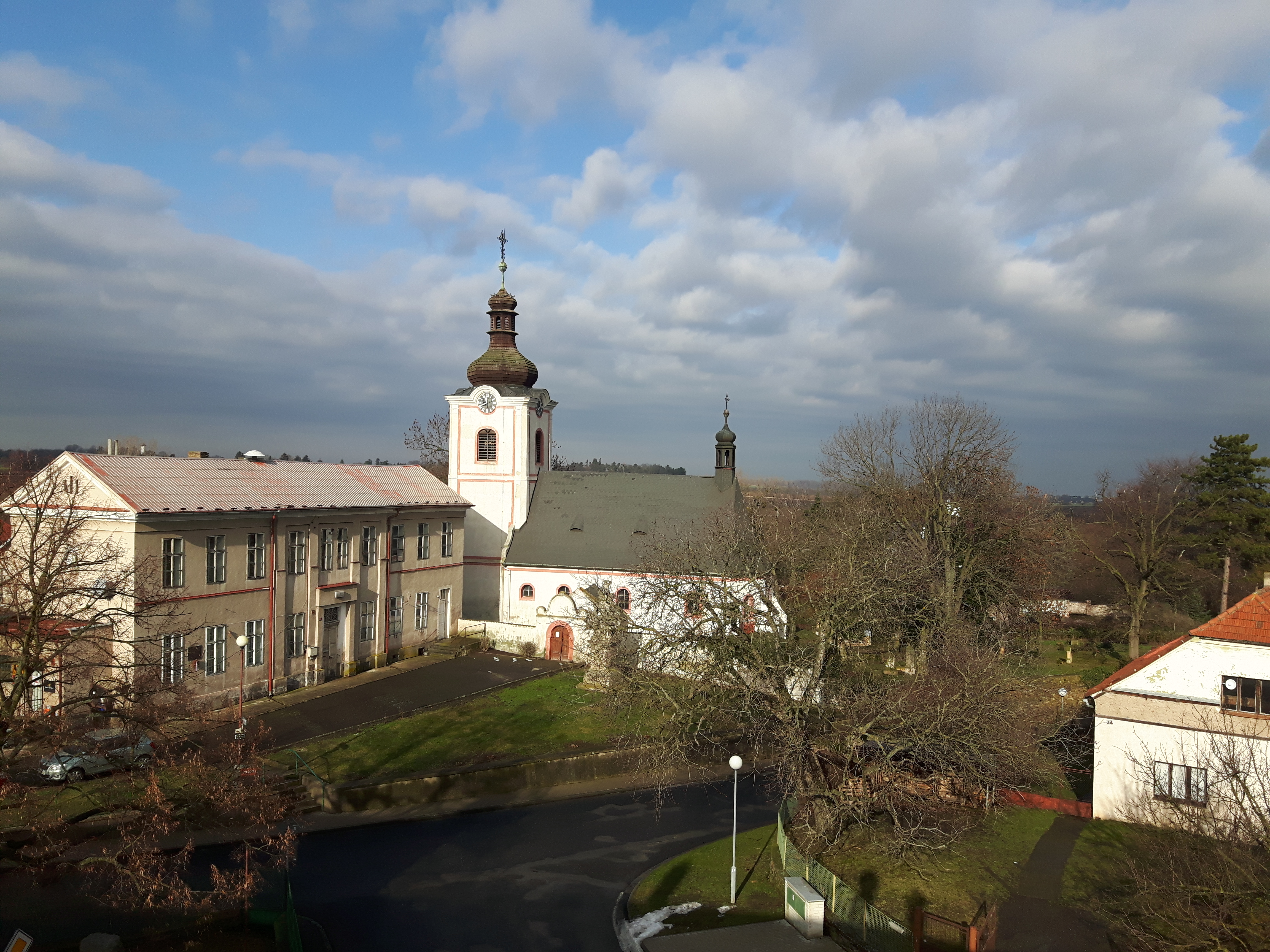 Pohled z OÚ na kostel